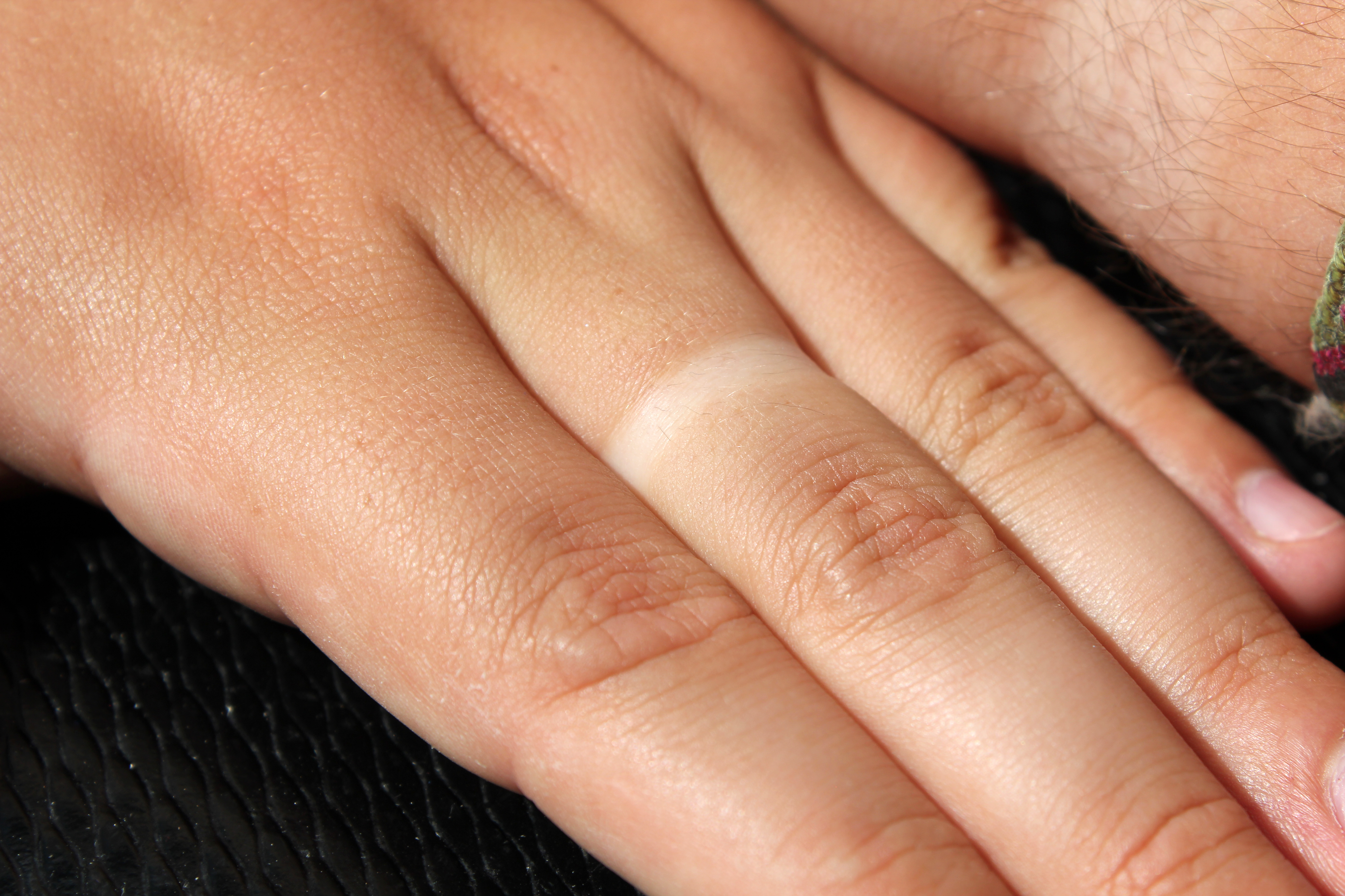 Wedding ring tan line